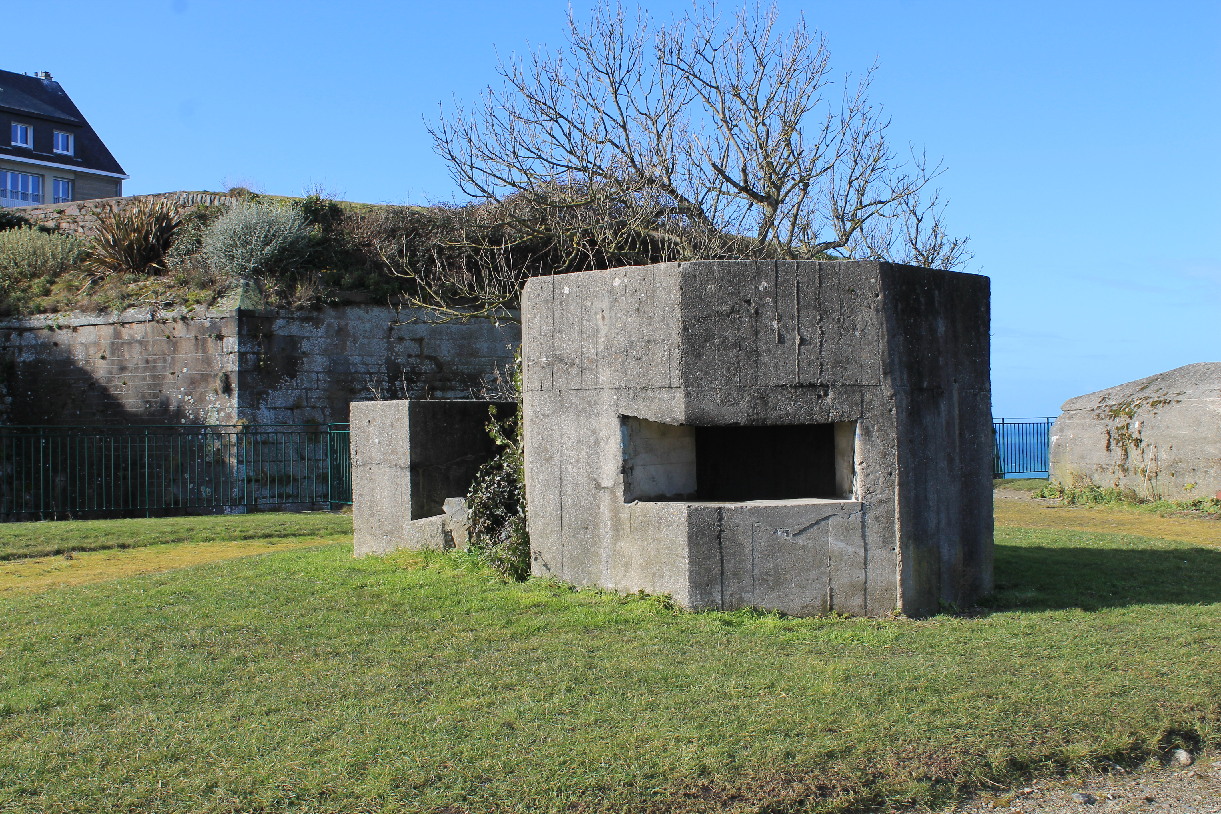 Granville - Vieille ville (Bunker pour Mg)